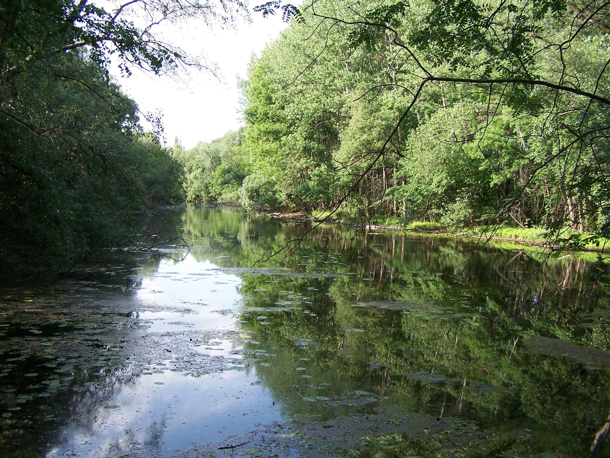 Little Danube in Dunajský Klátov (Dunatőkés), Slovakia